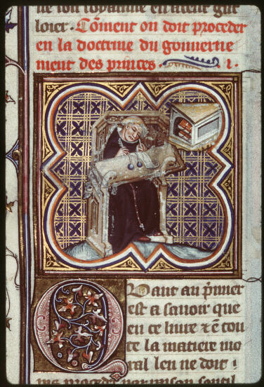 Gilles de Rome écrivant, Enluminure du XIVe siècle.